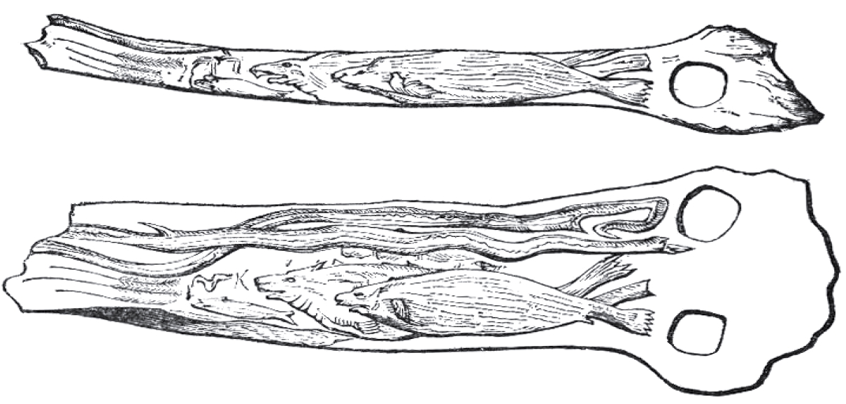 Bâton de commandement préhistorique, trouvé dans la grotte de Montgaudier